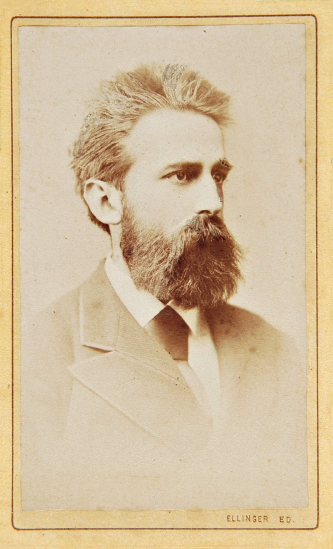 Szőgyény-Marich László jogász (1840–1916)